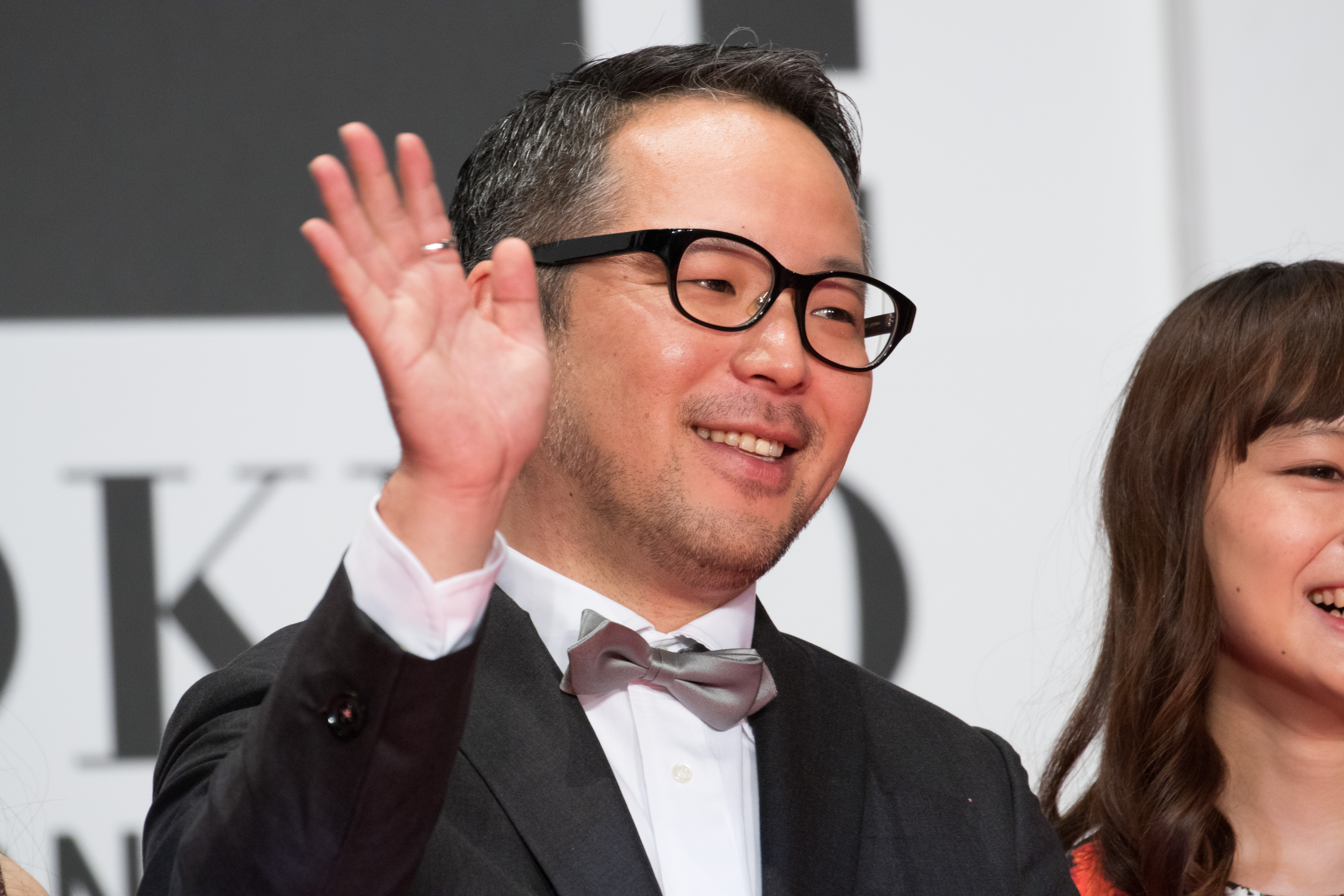 第29回 東京国際映画祭 オープニングセレモニー 菊地健雄 (ハローグッバイ)